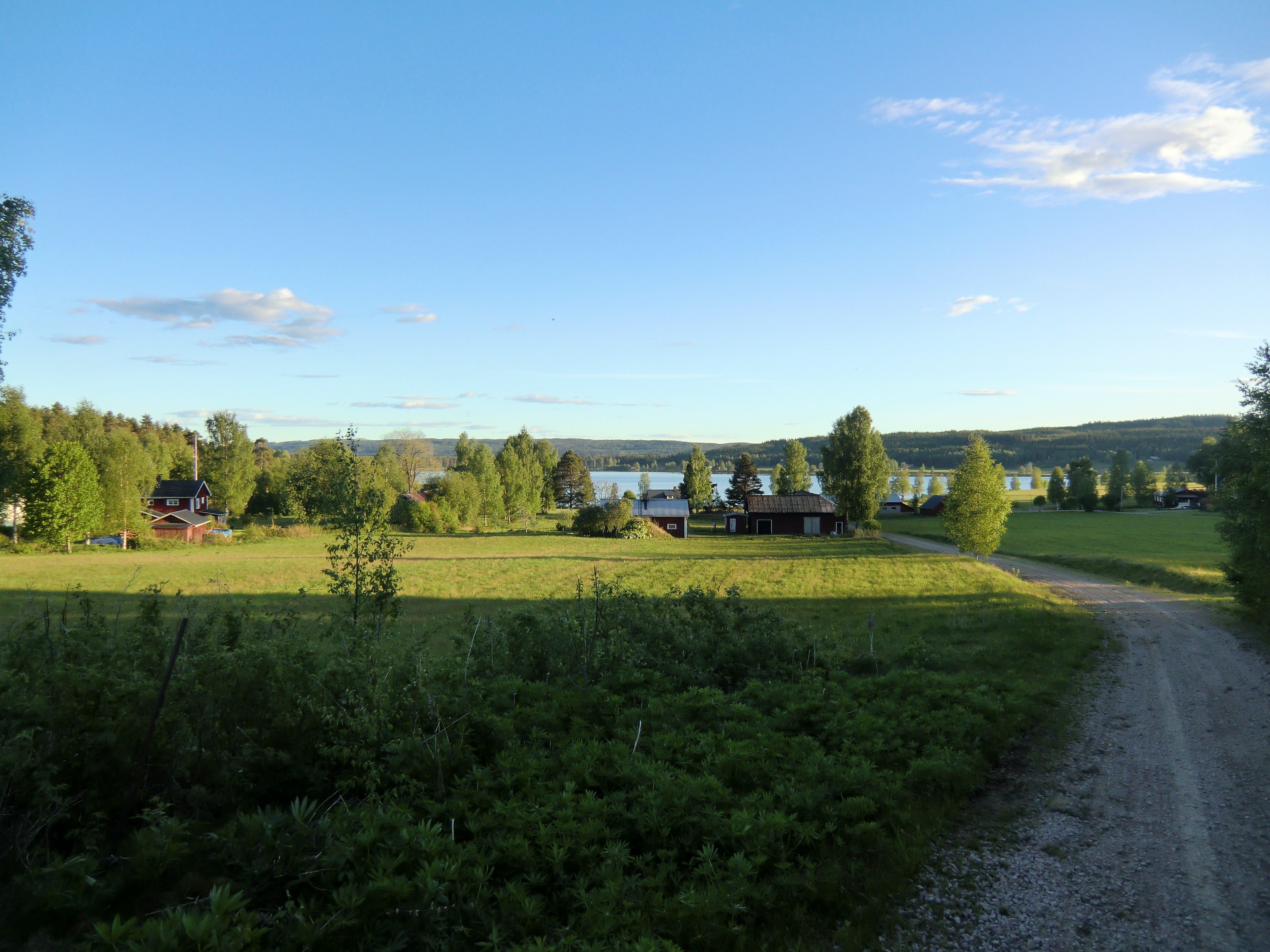 Grinnemo i Gräsmarks socken, Värmland.